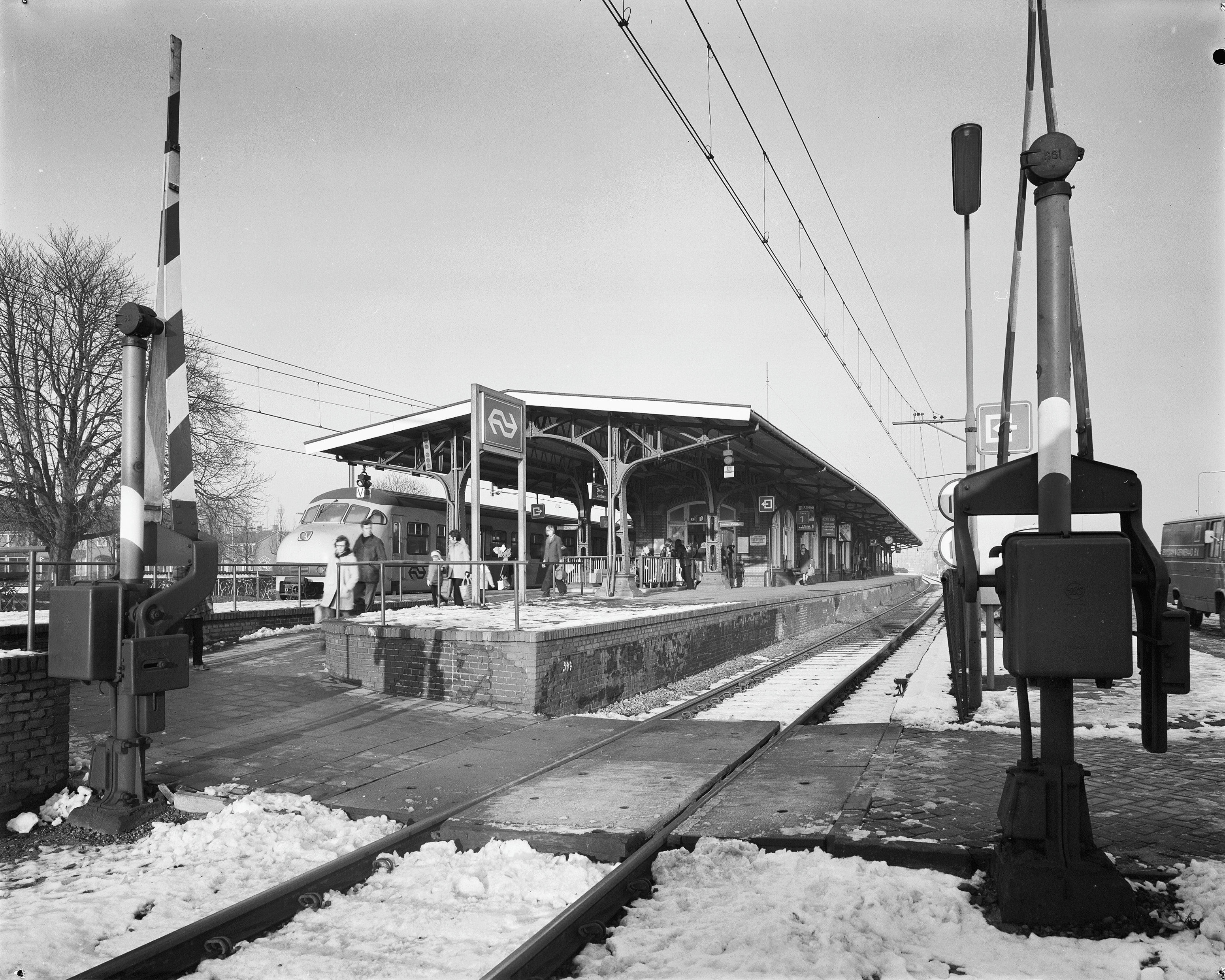 Station N.S.: overkapping